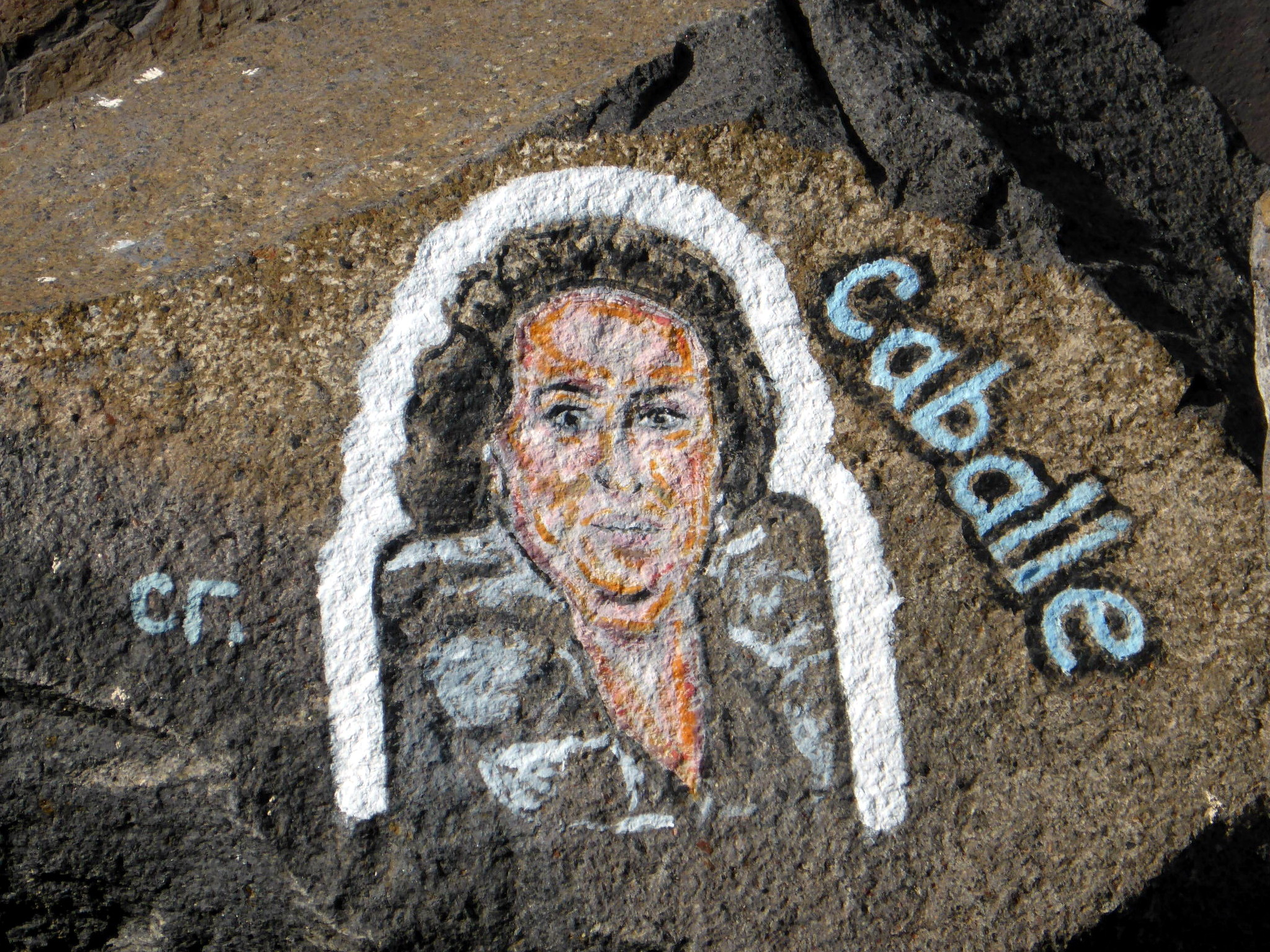 Montserrat Caballé entre les cent cares de l'auditori de Tenerife.